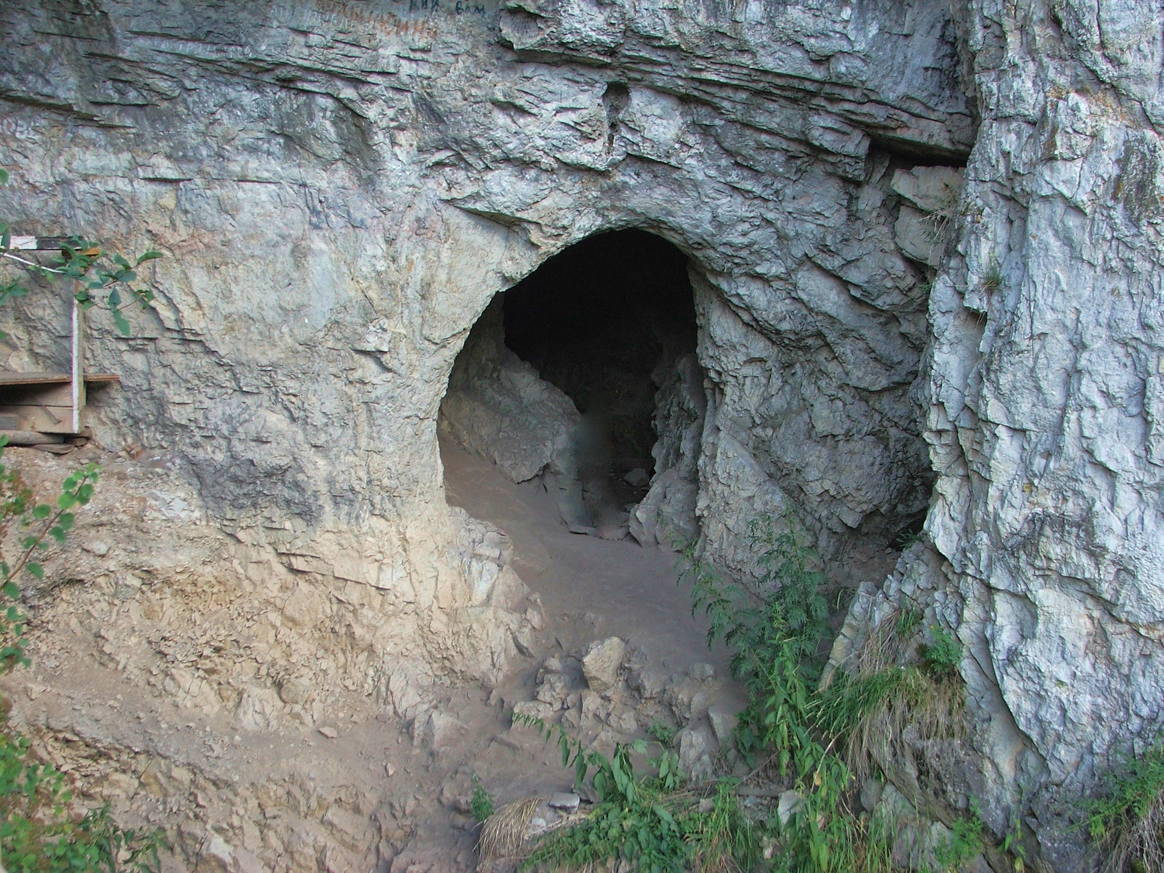 Денисова пещера: Солонешенский район, Алтайский край This image is related to the protected area of Russia number 2210161